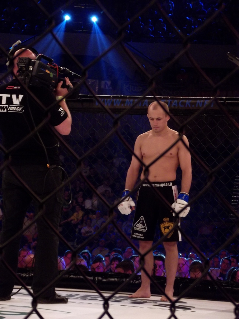 Zdjęcie zrobione podczas gali mieszanych sztuk walki MMA Attack 2 w katowickim Spodku.